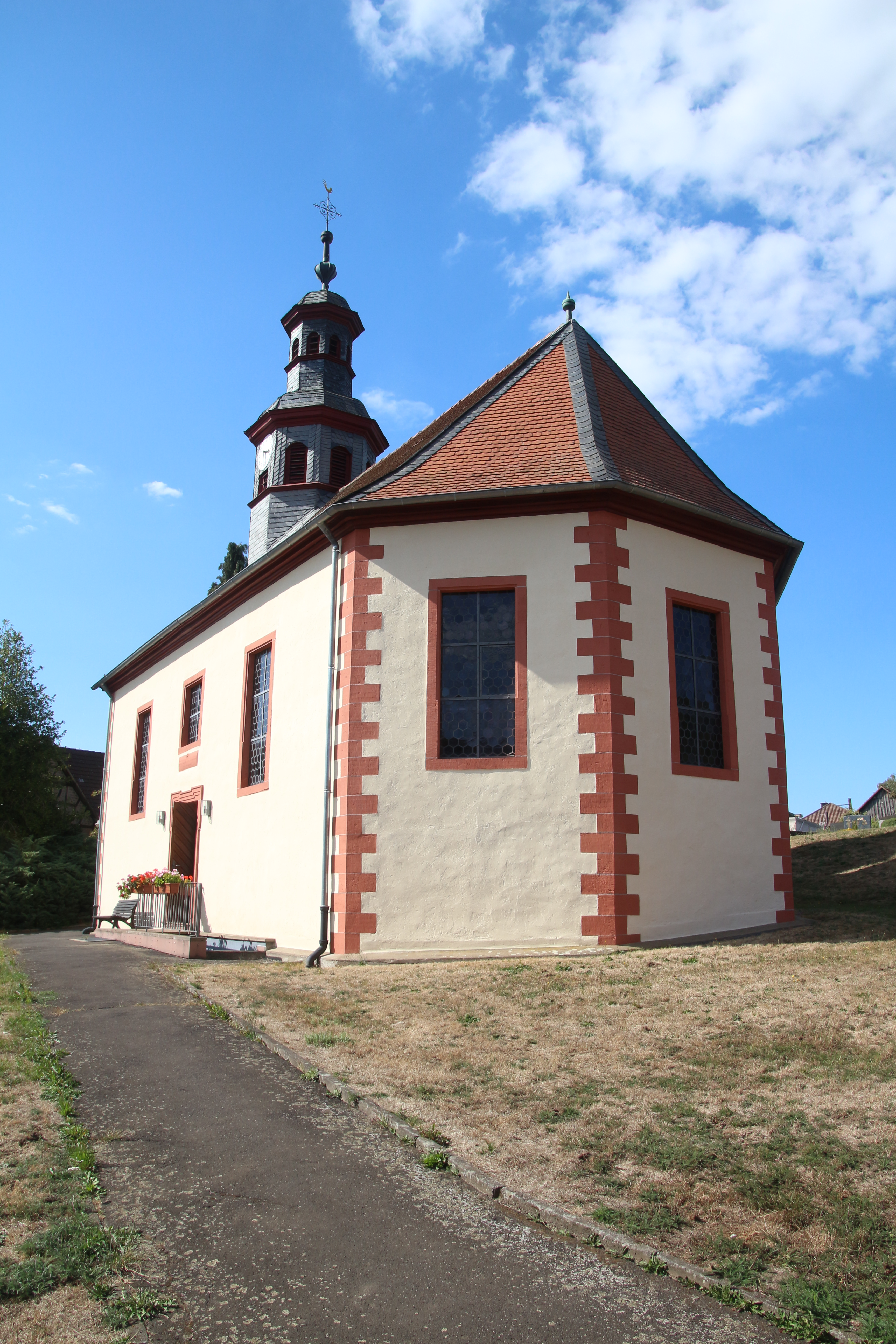 Evangelische Kirche Wallernhausen, Gemeinde Nidda, Wetteraukreis, Hessen